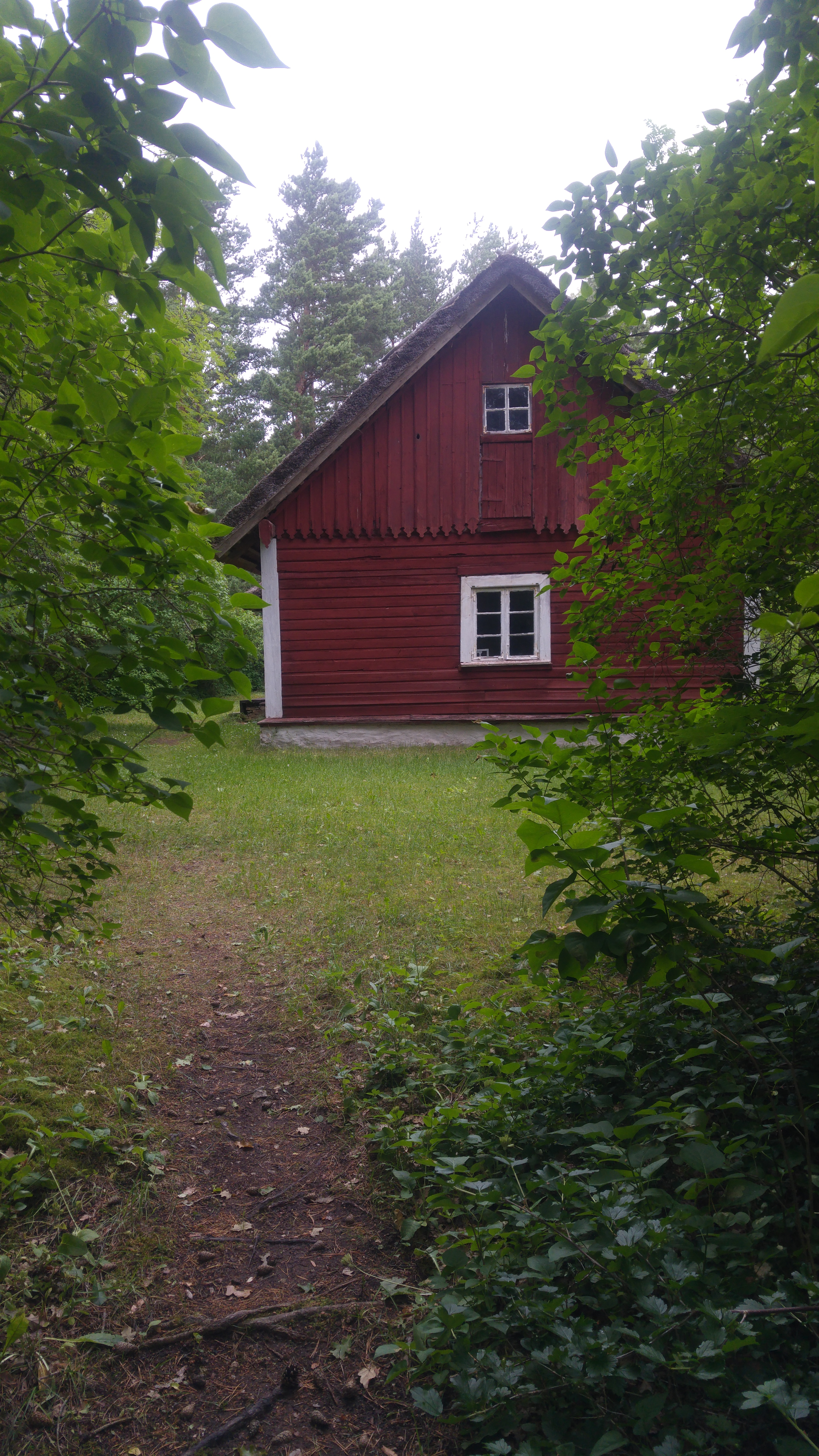 Kultuurimälestiste nimekirjas leiduv Aino ja Oskar Kallase suvemaja Kassaris on tuntud ka kui kordonimaja. Selle ehitas Vaemla mõisa kutsarist kupjaks karjääri teinud Villem Tamm (Johann Köleri Kaarli kiriku fresko tarbeks kasutatud nägu). Enne Kallaseid suvitasid selles majas erinevatel aegadel ka Marie Under ja Artur Adson ning Paul ja Kristjan Raud (kellel käis külas ka Paula Brehm). Praegu kuulub maja Arderite suguvõsale ja seal on oma suvesid veetnud vennad Ott ja Jaan Arder.